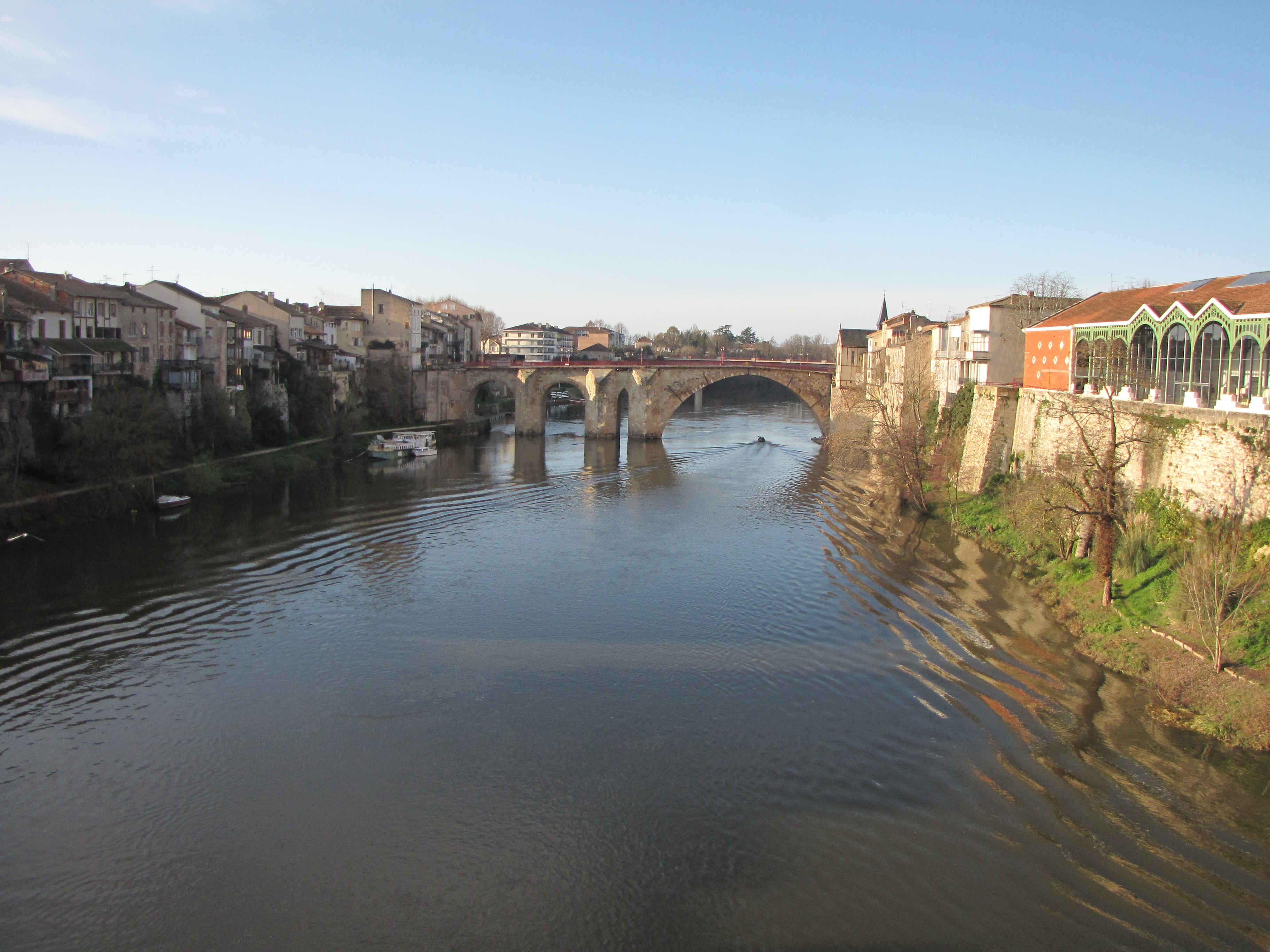 Pont des Cieutat à Villeneuve-sur-Lot